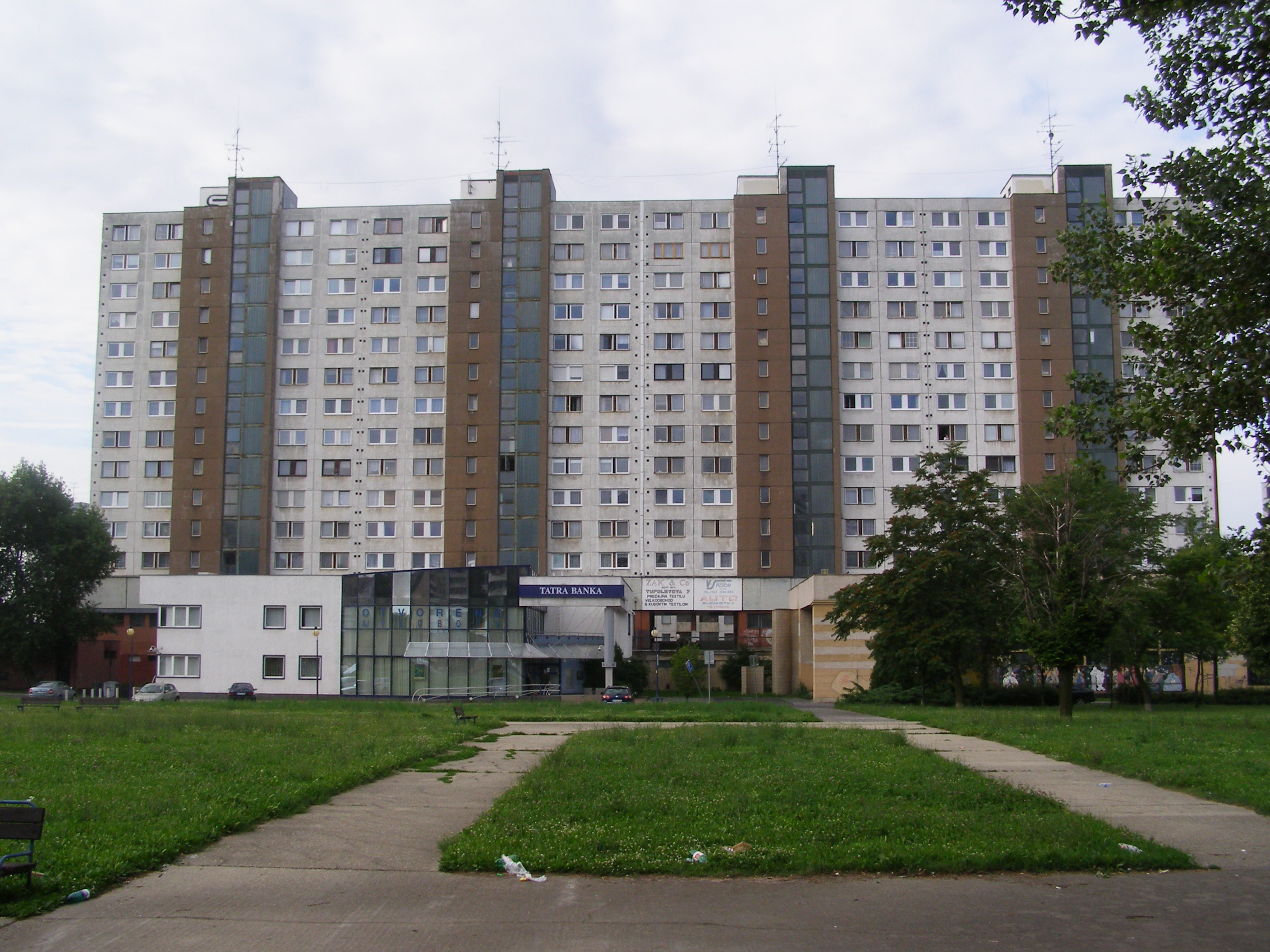 Tupolevova street, Petržalka, Bratislava